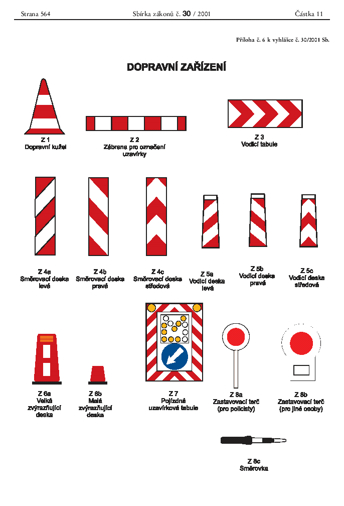 Česká dopravní zařízení podle vyhlášky ministerstva vnitra č. 30/2001 Sb., kterou se provádějí pravidla provozu na pozemních komunikacích a úprava a řízení provozu na pozemních komunikacích.